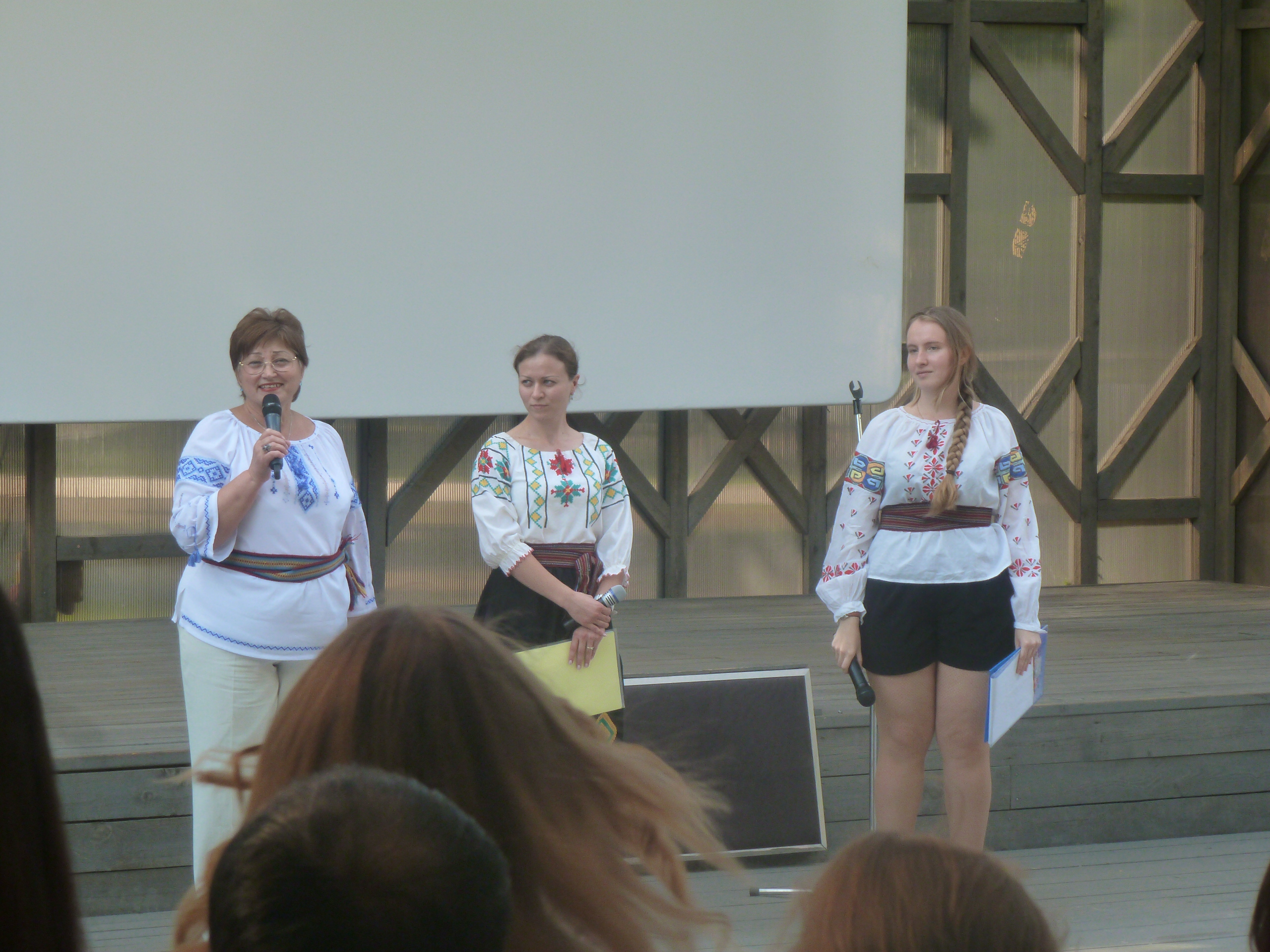 Выступление с молдавскими песнями в парке Музеон, Москва (9 августа 2014)